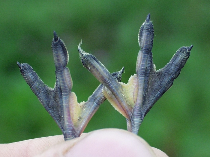 Vékonycsőrű víztaposó úszólába (Mekszikópuszta, Győr-Moson-Sopron megye)